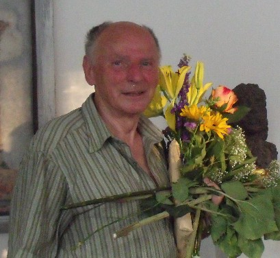 Der Bildhauer und Maler Siegfried Krepp während einer Ausstellungseröffnung in Berlin.